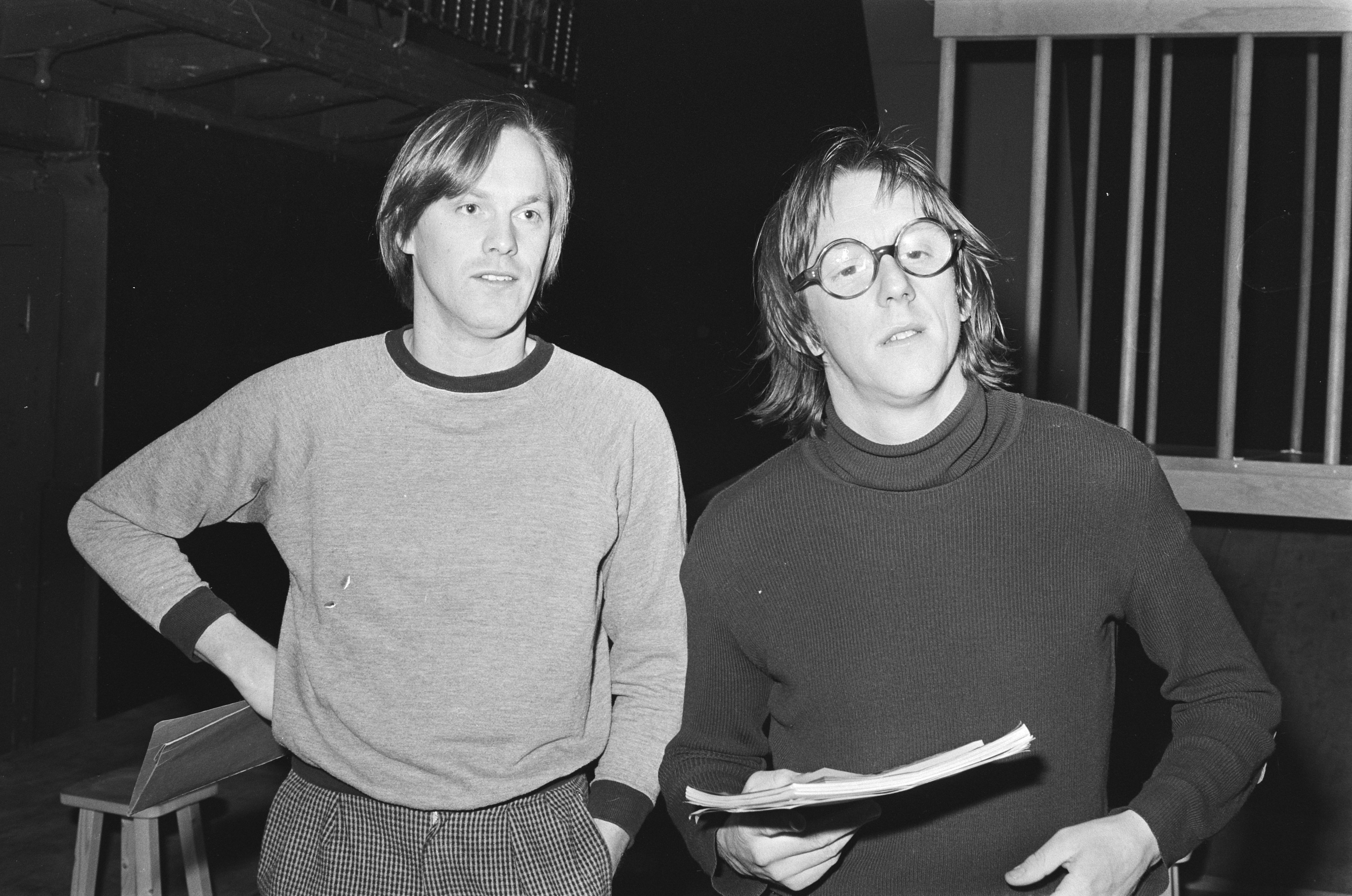 Persconferentie Bram Vermeulen en Freek de Jonge i.v.m. actie tegen Nederlands elftal naar Argentinie in Brakkegrond Amsterdam